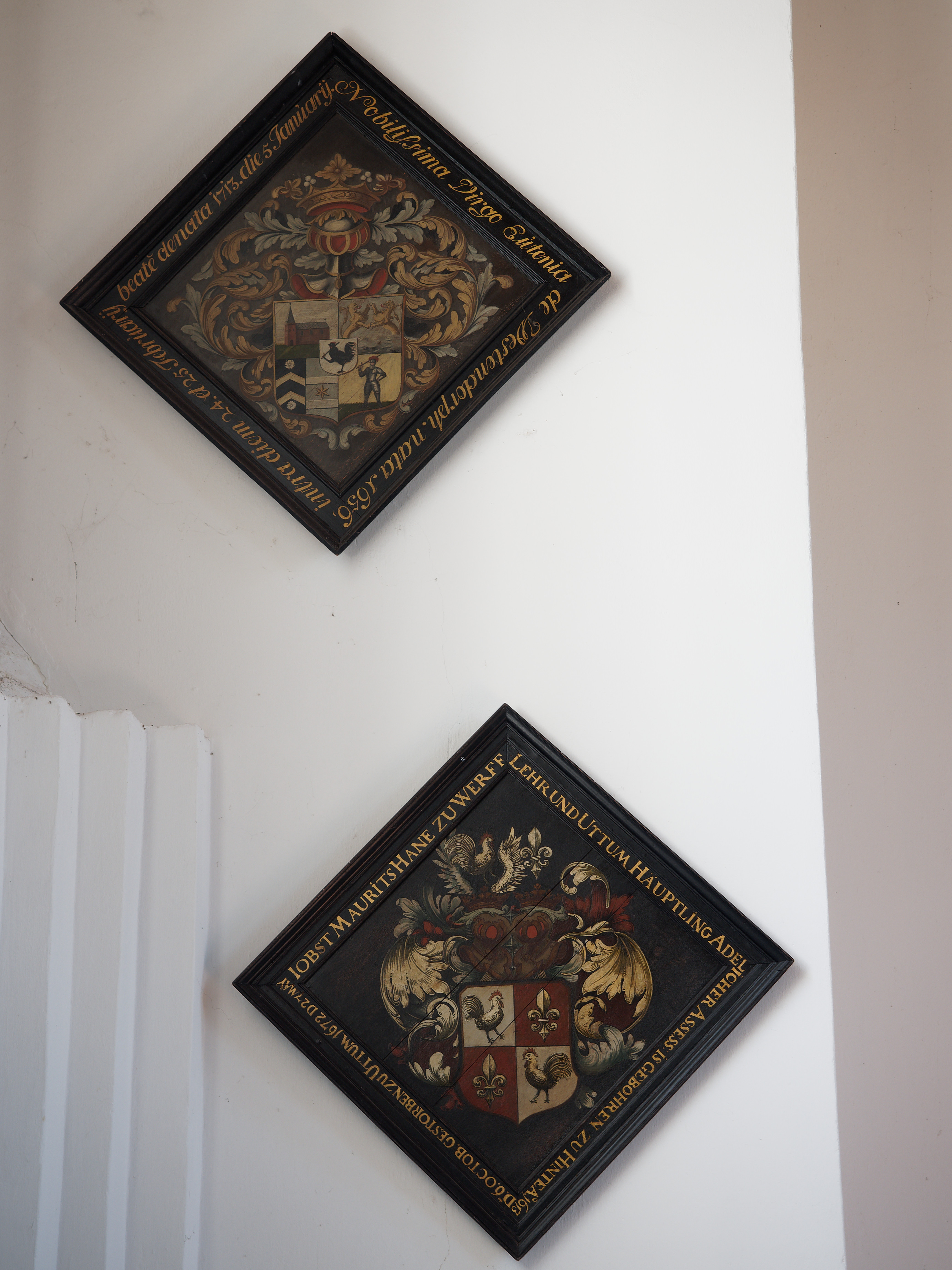 Epitaph für Nobilissimo Virgo Eutenia de Westendorph und Jobst Maurits Hane zu Werff Lehr und Uttum in der ev. reformierten Kirche in Uttum (Ostfriesland).